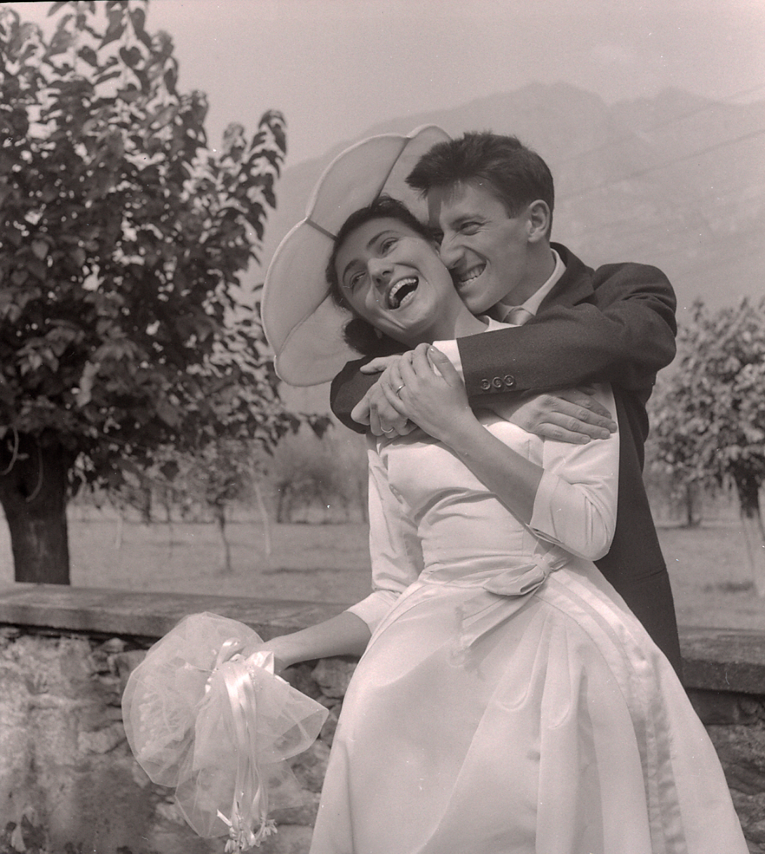 Serie fotografica : Italia, 1960 / Paolo Monti. - Buste: 1, Fototipi: 12 : Negativo b/n, gelatina bromuro d'argento/ pellicola ; 6x6. - ((Serie costituita da 12 negativi identificati con i nn.: R5138-5149 contenuti in un portanegativo. Sul dorso del portanegativo manoscritto: "Rovelli. Graziella e Riccardo". La suddetta serie è contenuta nella scatola identificata con la numerazione R4953-5160. Sul coperchio della scatola, manoscritto a pennarello: "Ritratti".